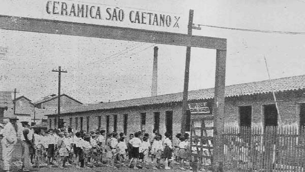 Escola mantida pela Cerâmica São Caetano S/A destinada aos filhos dos operários.